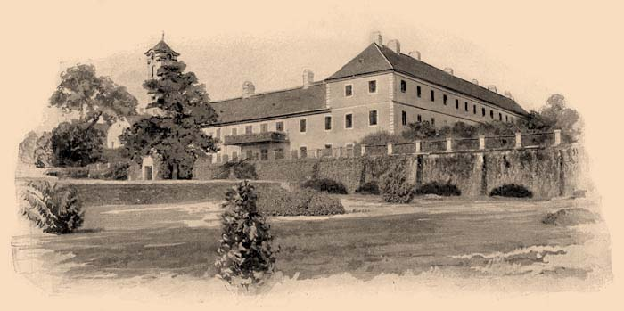 Az Oroszlány melletti Majk kastélya az 1800-as évek végén. Eredeti képaláírás: „A kamalduliak hajdani kolostora Majk pusztán. Gróf Esterházy Miklós Móricz kastélya.”